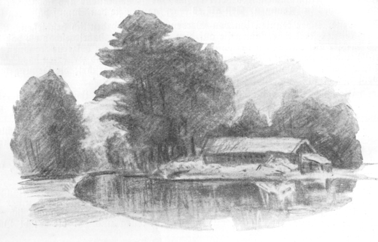 Originalbildunterschrift: Kito Panks Hütte.